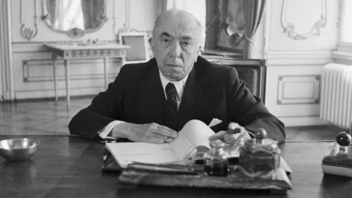 Президент Эмиль Гаха в своём кабинете в Пражском Граде